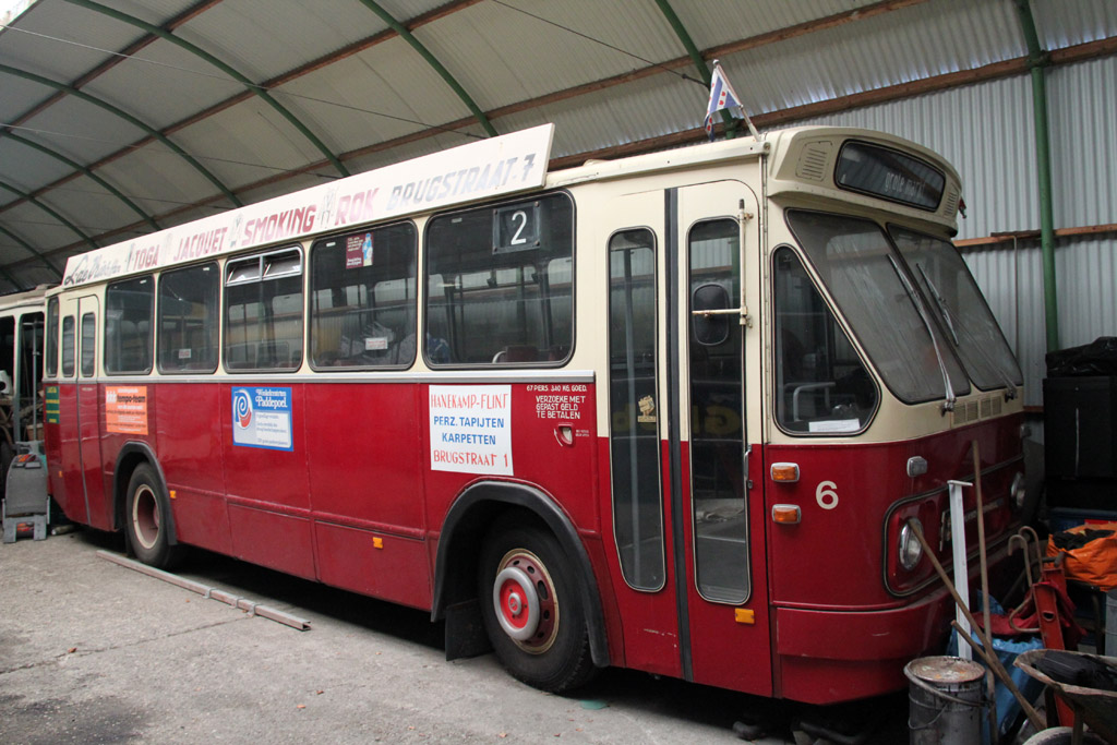 Museumbus van het Nationaal Openbaar Vervoermuseum in Ouwsterhaule.